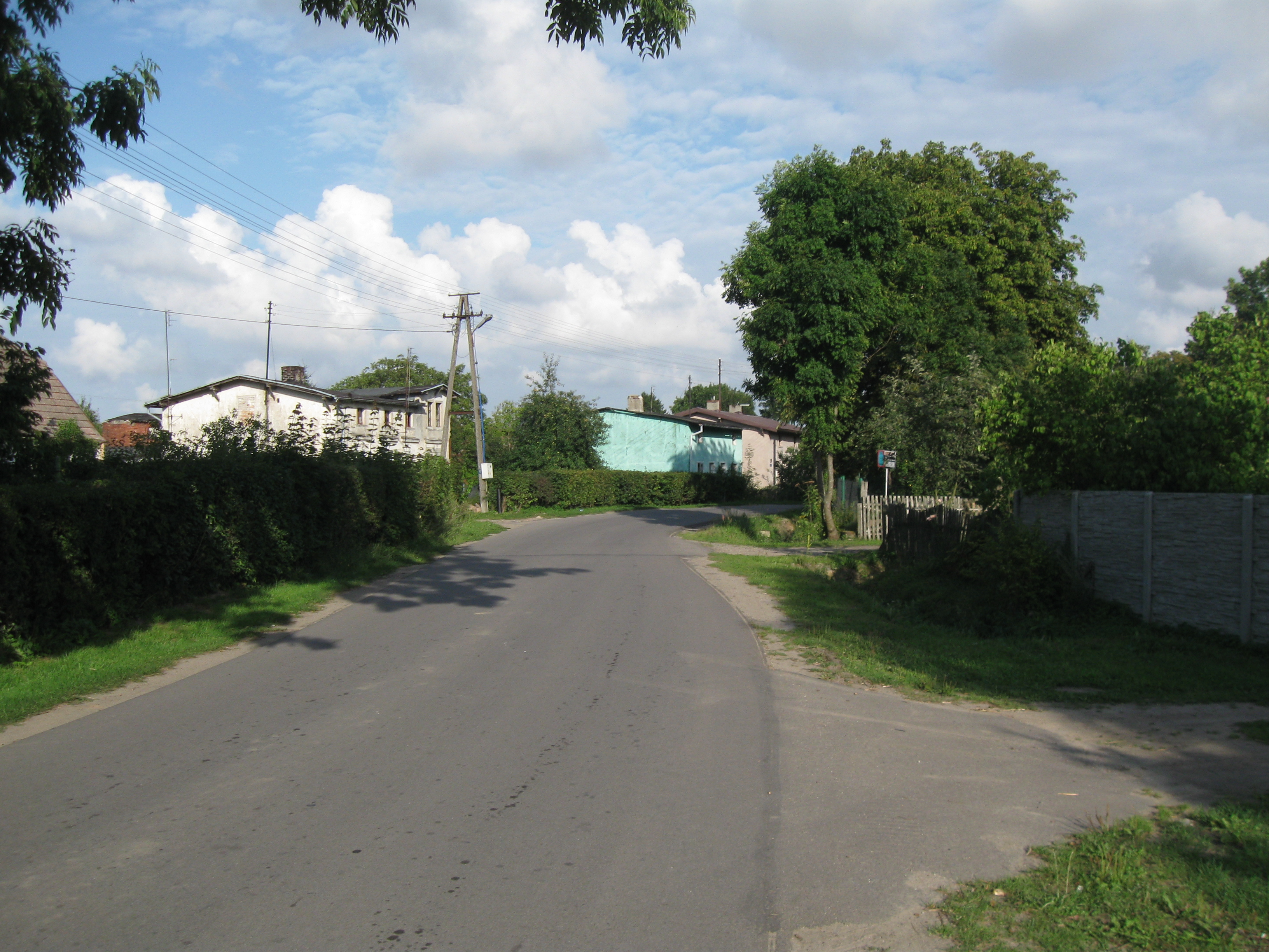 Ulica Zielona w Charzynie